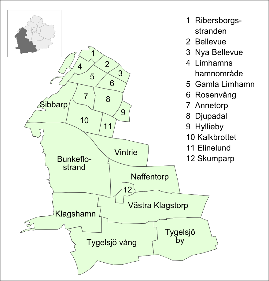 Delområden i Limhamn-Bunkeflo, Malmö 2009